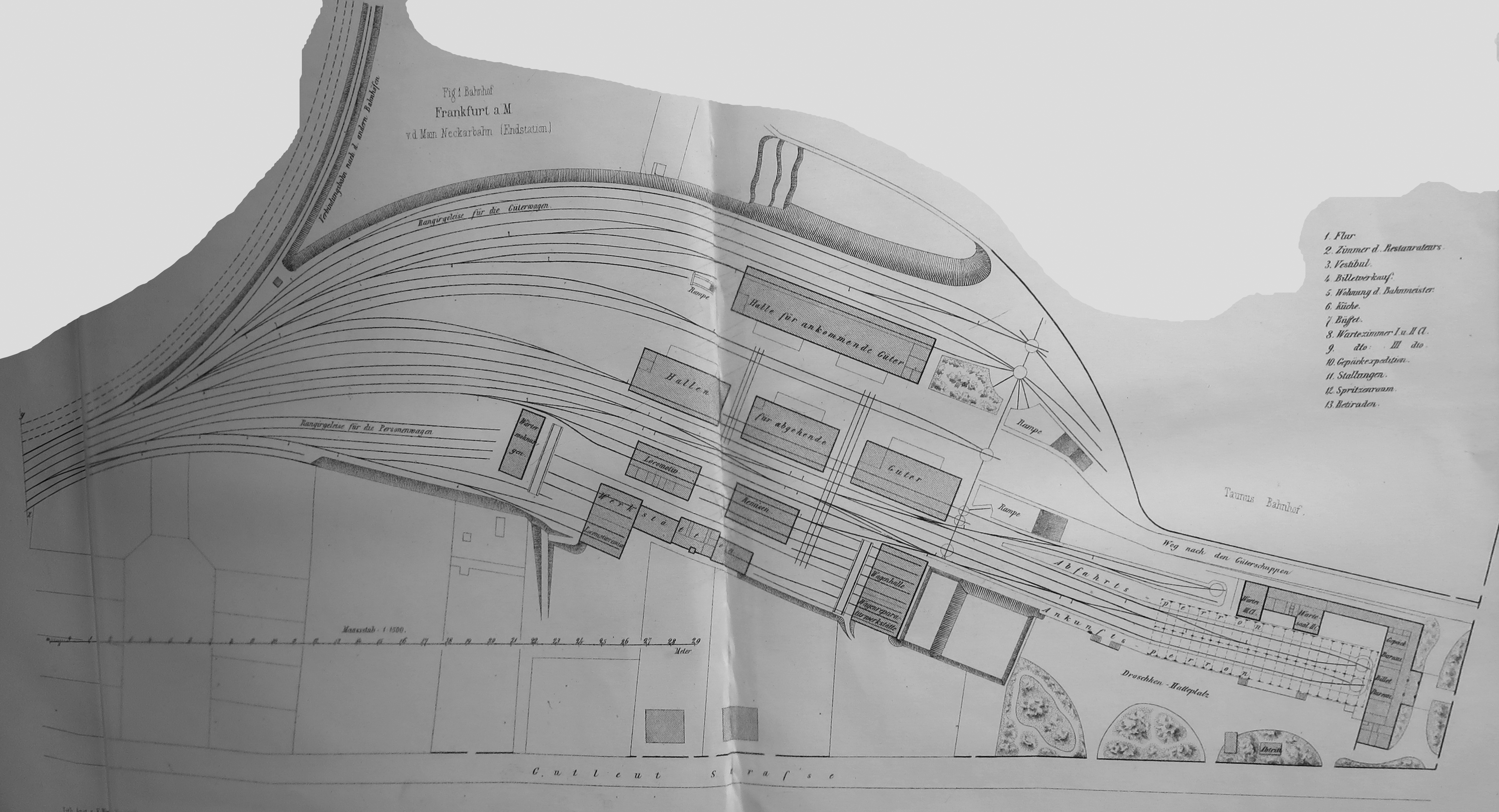 Gleisplan des Main-Neckar-Bahnhofs in Frankfurt am Main 1870 oder kurz zuvor